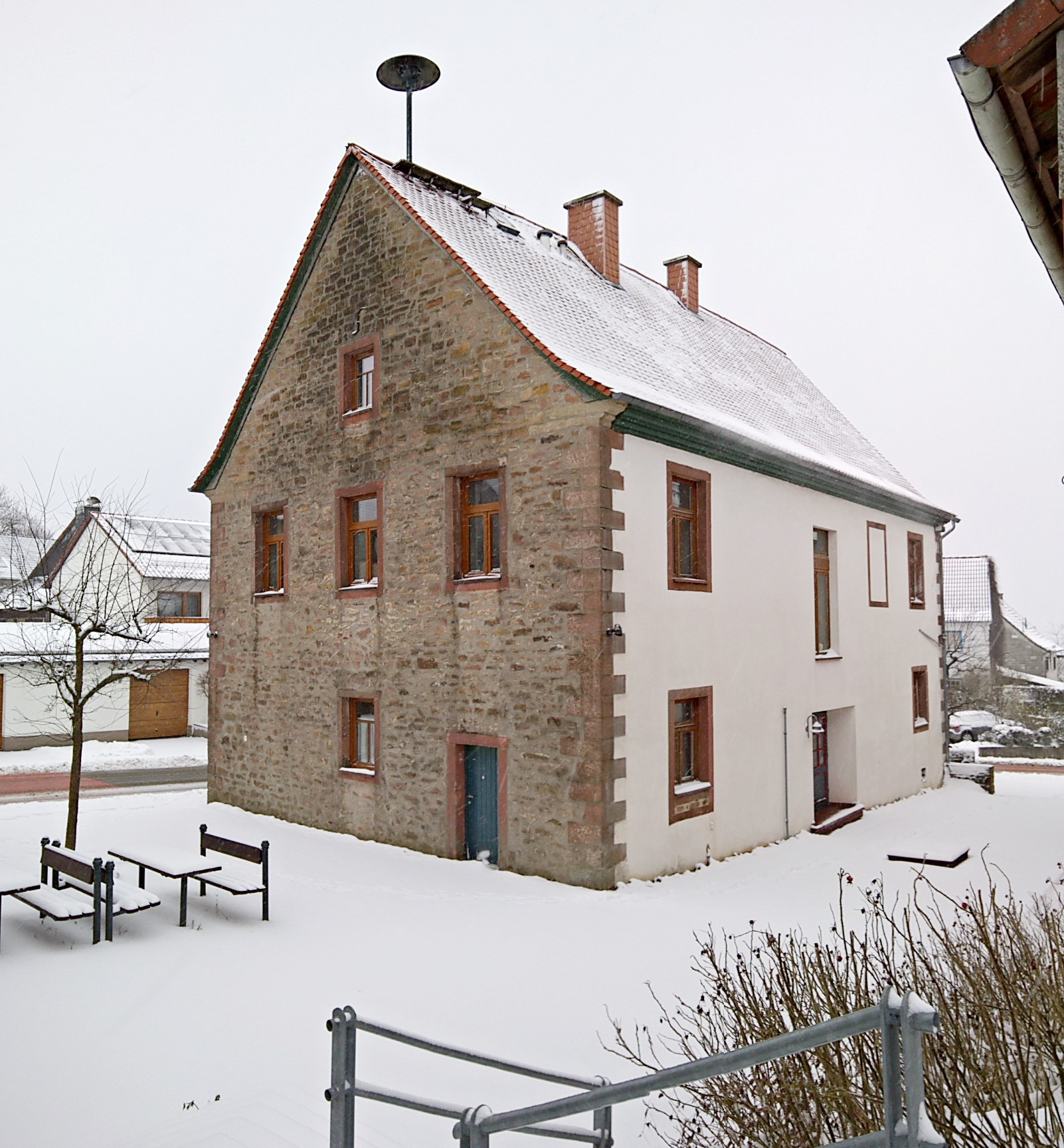 Ehemaliges isenburgisches Amtshaus, Schulwaldstr. 10 in Brachttal-Spielberg, heute Brachttal-Museum beherbergend / Rückseite. Bild ist digital nachbearbeitet